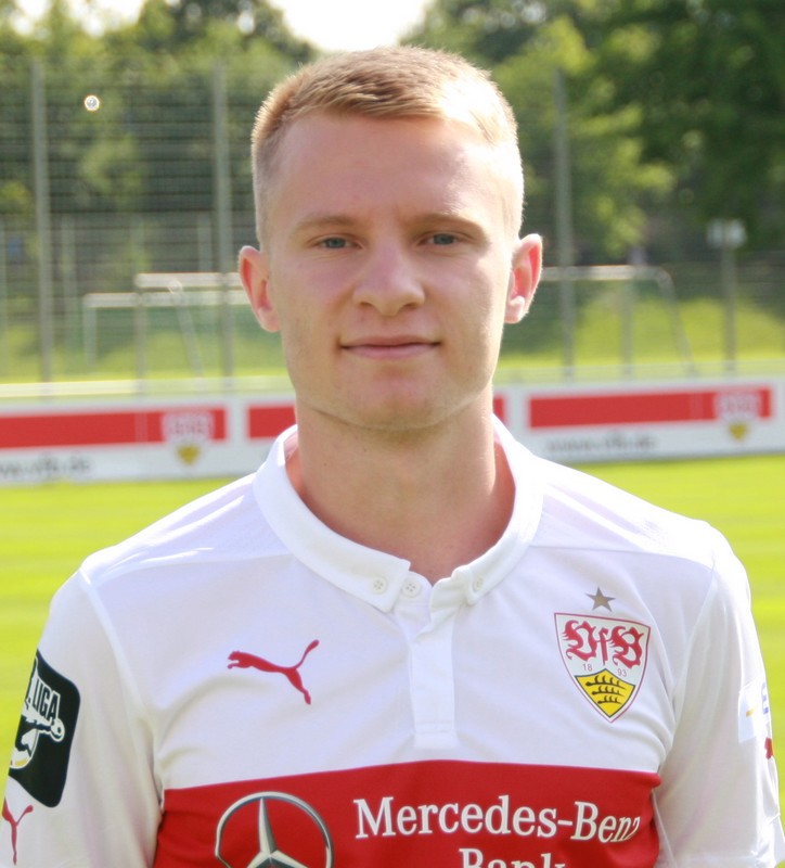 Marvin Weiss beim offiziellen Fototermin des VfB II. Aufgenommen von